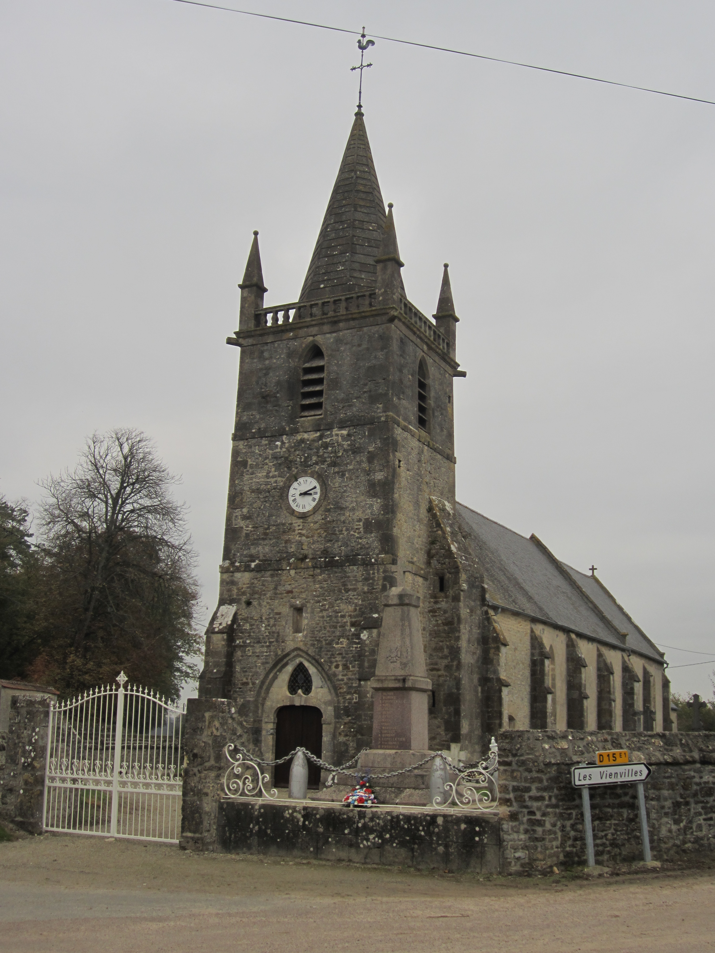 Neuville-au-Plain, Manche